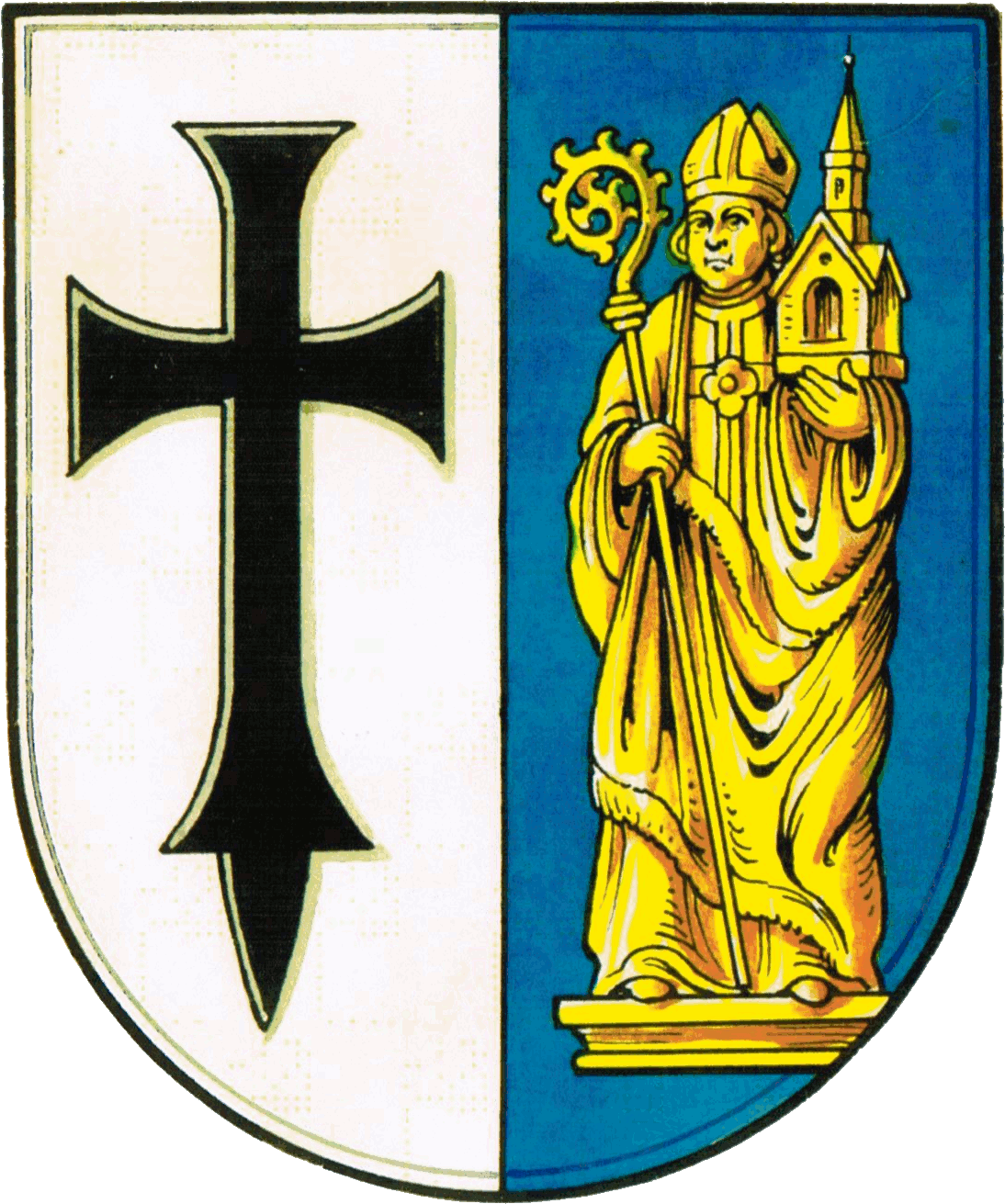 Coat of arms Wilstedt, Wappen der Gemeinde Wilstedt